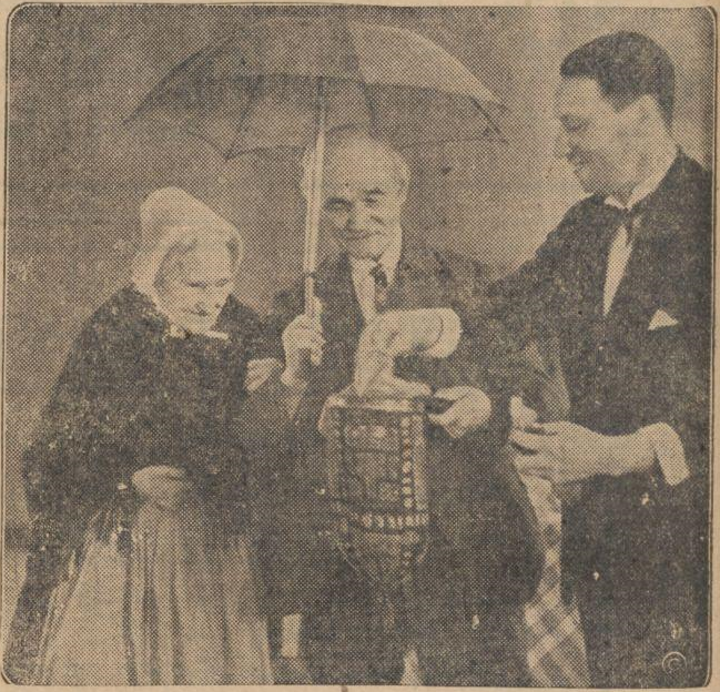 Michel Velleman (1895-1943), alias professor Ben Ali Libi.Original caption: "Hoe doet die man dat toch? HOCUS-POCUS IN HET OUDE MANNEN- EN VROUWENHUIS.— De goochelaar Ben Ali Libi heeft den bewoners en bewoonsters van het jubileerende Oude Mannen- en Vrouwenhuis aan den Amstel te Amsterdam een heerlijken middag bezorgd. Vol aandacht en in stijgende verbazing volgden de oudjes zijn handelingen en hoewel zij zich de verrassende resultaten daarvan maar niet begrijpen konden, amuseerden zij zich kostelijk."